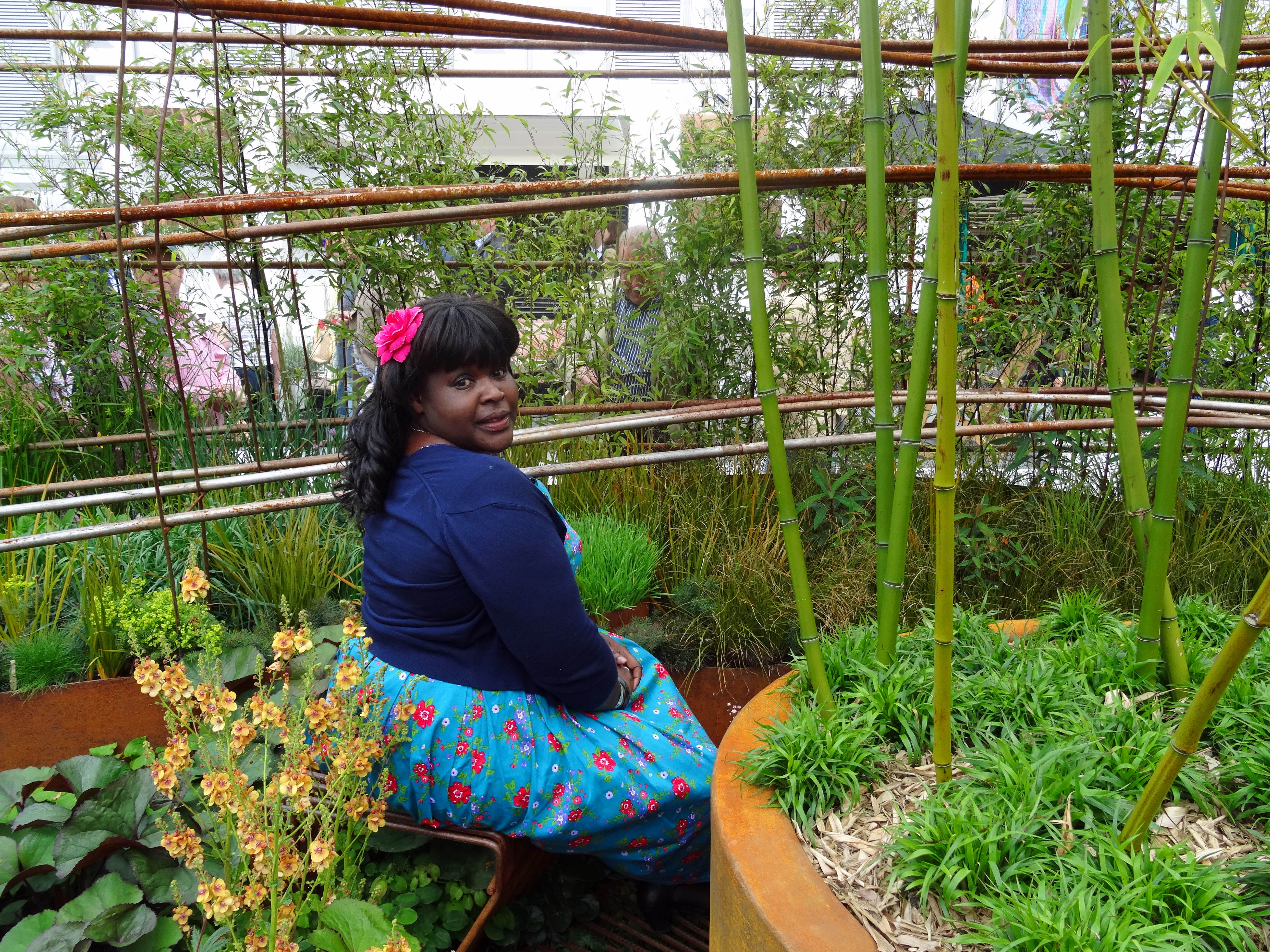 Dr Maggie Aderin-Pocock MBE in the Dark Matter garden, RHS Chelsea 2015